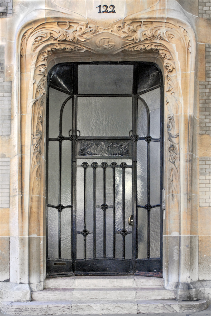 Entrée de l'immeuble art nouveau conçu par Hector Guimard au 122 avenue Mozart à Paris pour lui servir de demeure et de bureau d'études. Au-dessus de la porte, on peut observer les initiales entrelacées de l'architecte HG